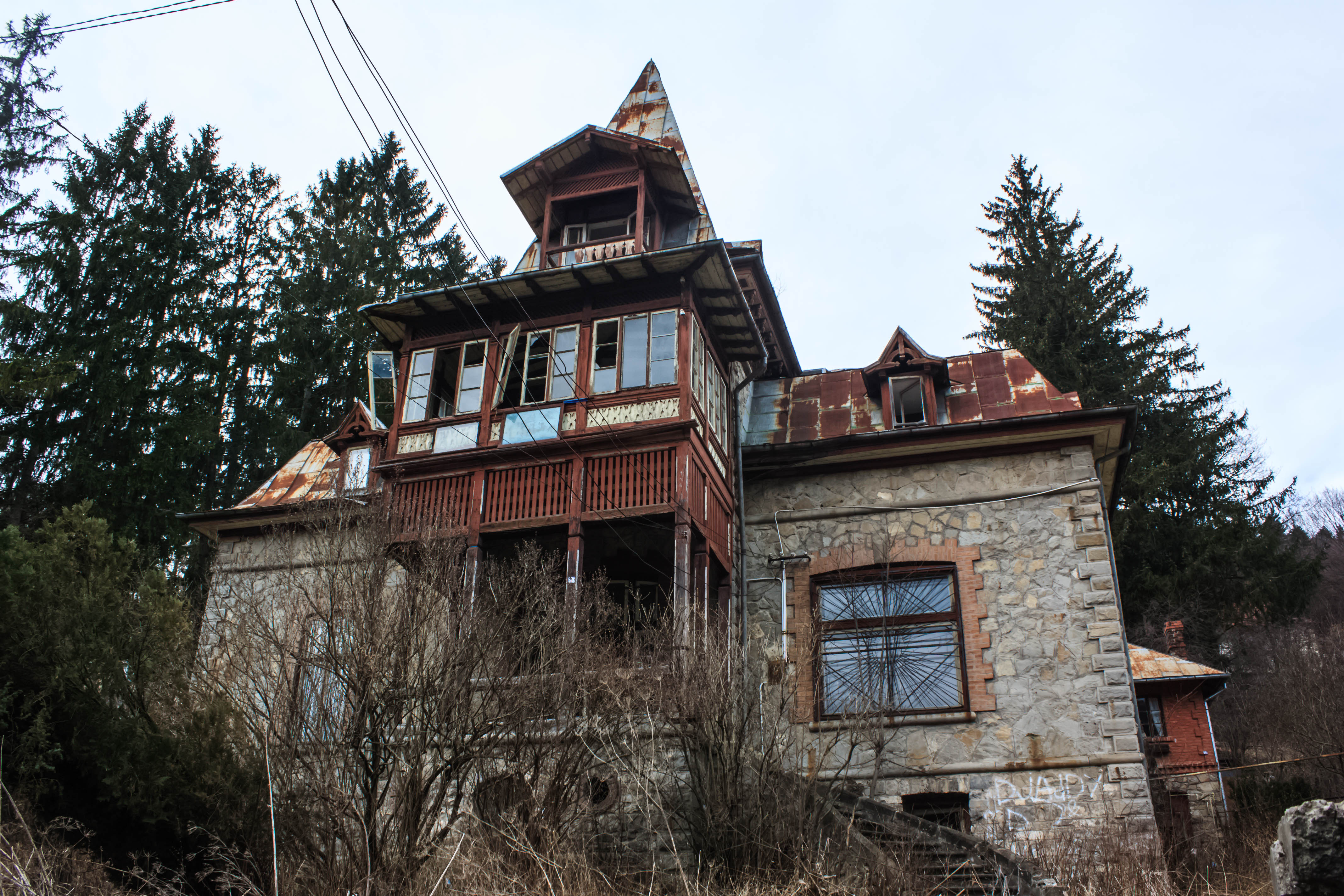 Casă, fosta Casa de Cultură Orășenească